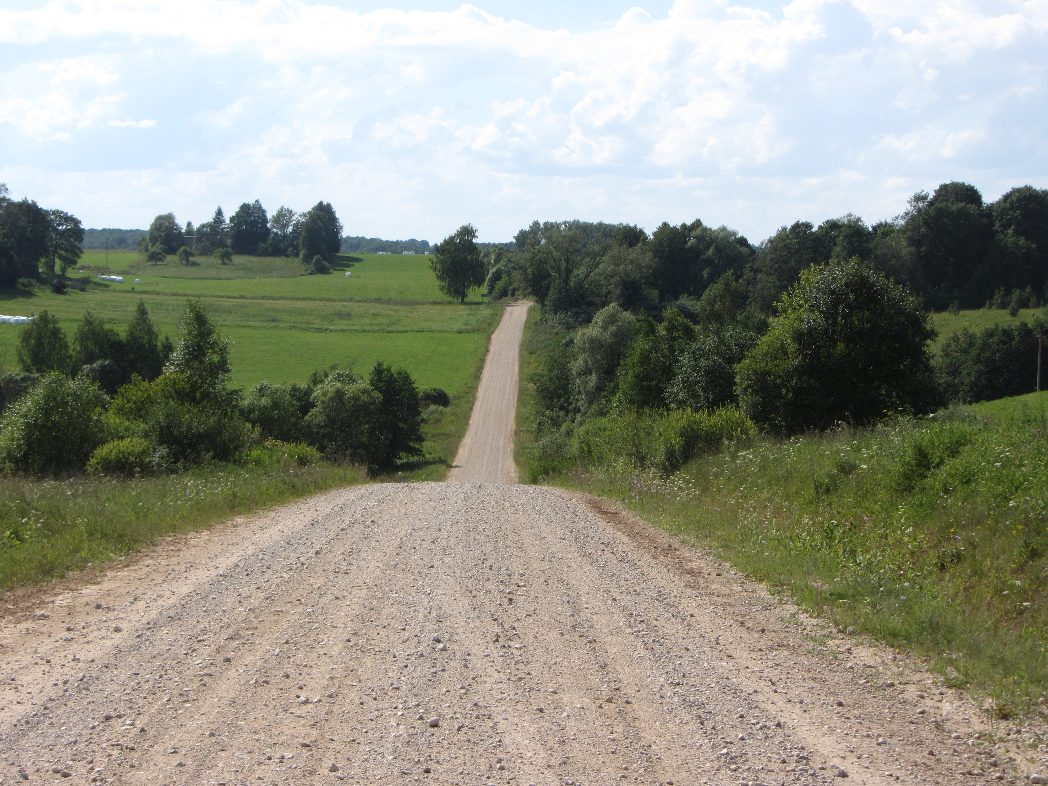 Antalieptės sen., Lithuania